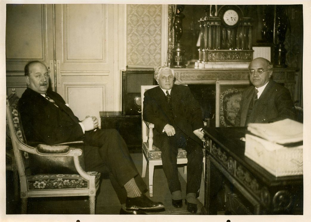 Pierre-Étienne Flandin, Joseph Paul-Boncour et Albert Sarraut, ministres du second gouvernement Albert Sarraut (24 janvier 1936 - 4 juin 1936). Réunion au ministère de l'Intérieur pour préparer le sommet genevois de la Société des Nations.